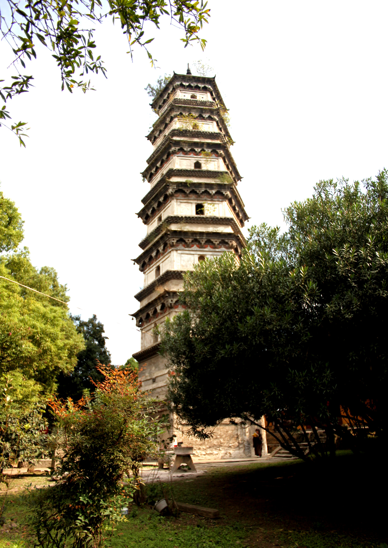 九江能仁禅寺大胜塔